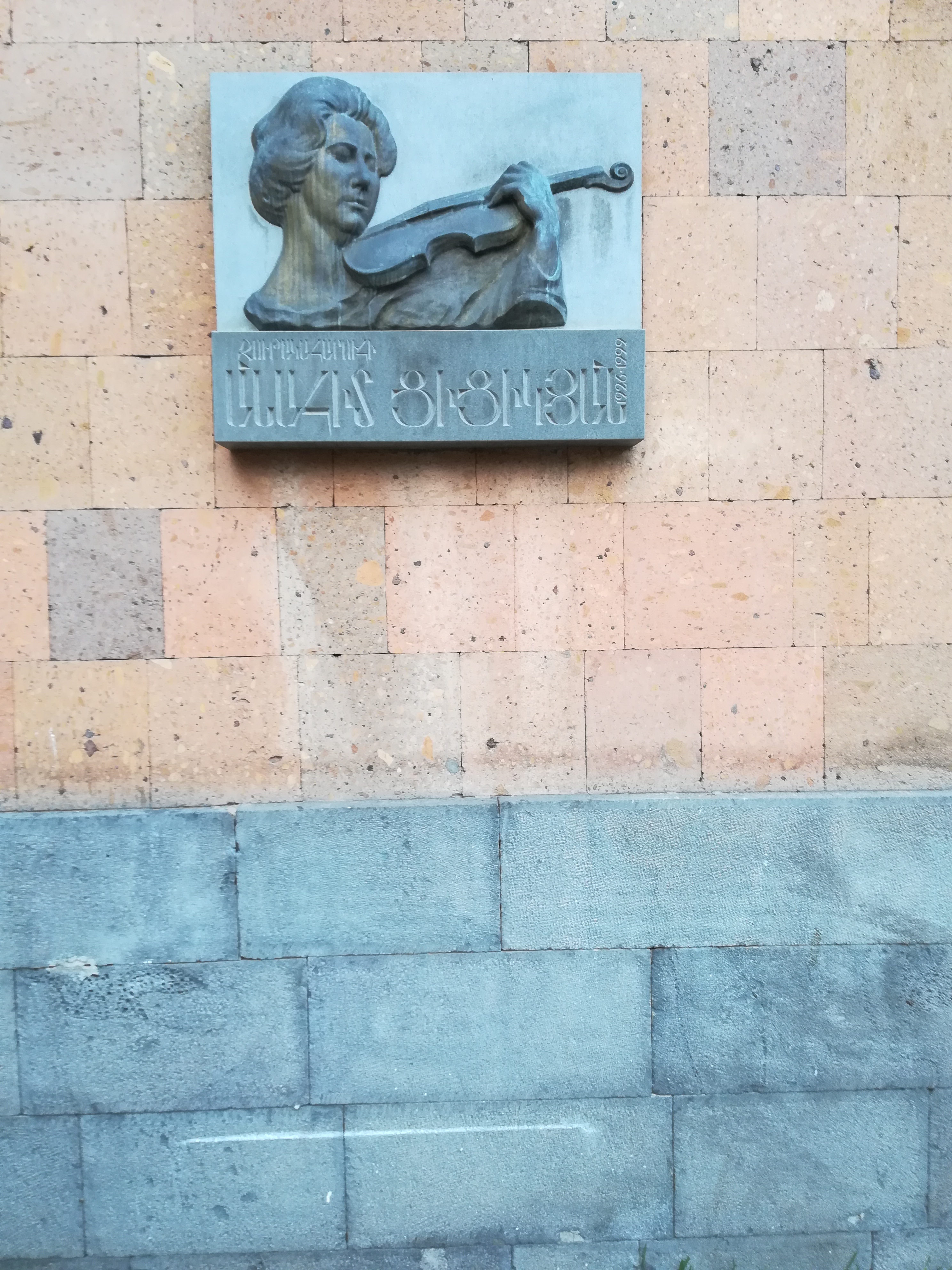 Ереван